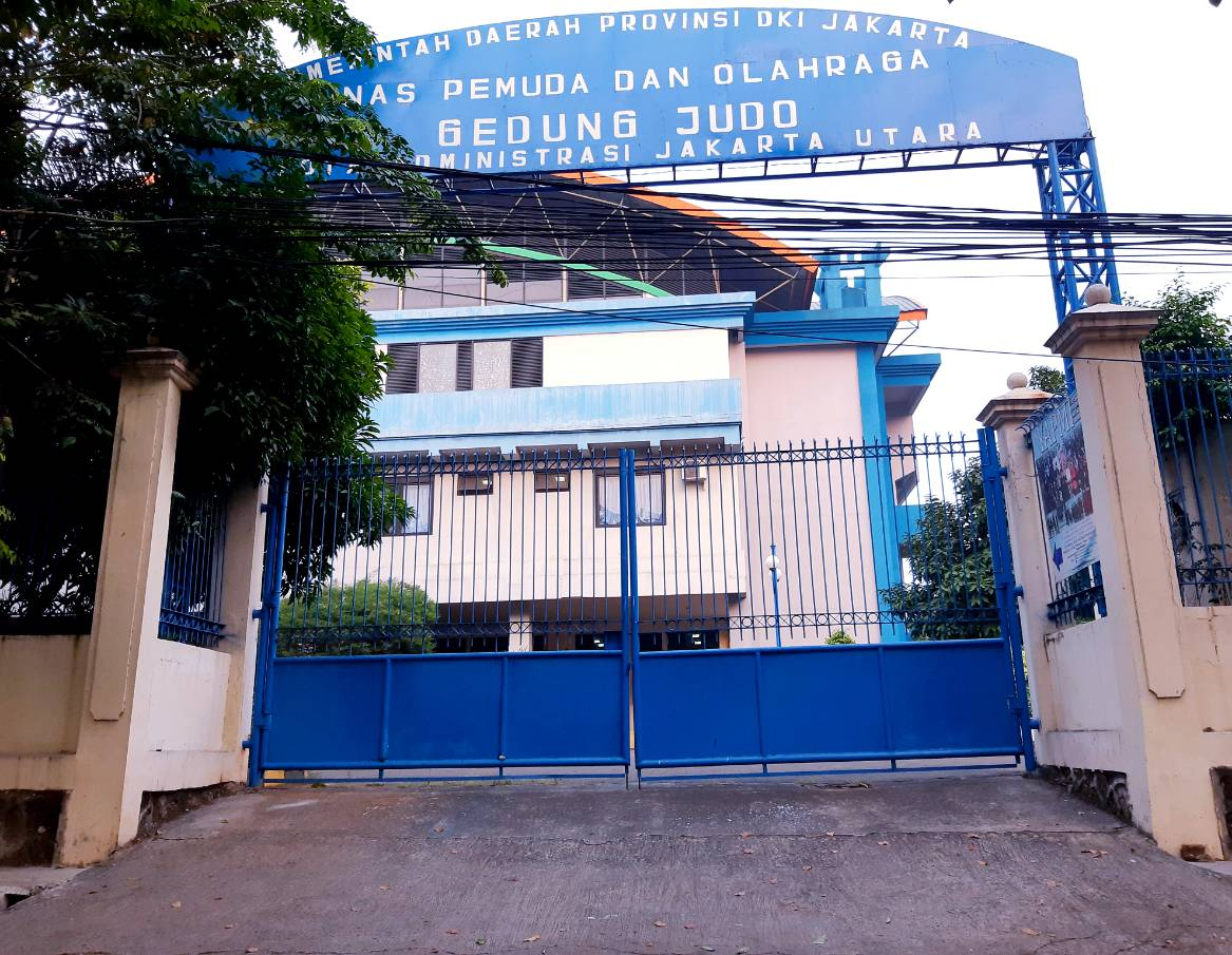 Tampak luar Gedung Judo Kelapa Gading